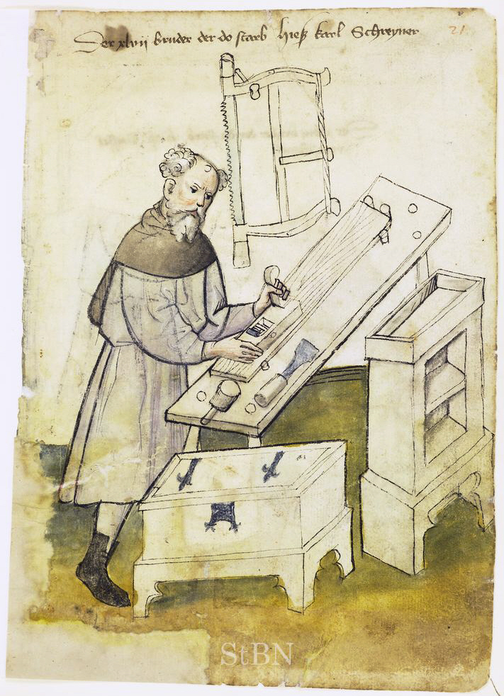 Karl schreyner (Schreiner) , schreyner (Schreiner) Transkription und weitere Informationen